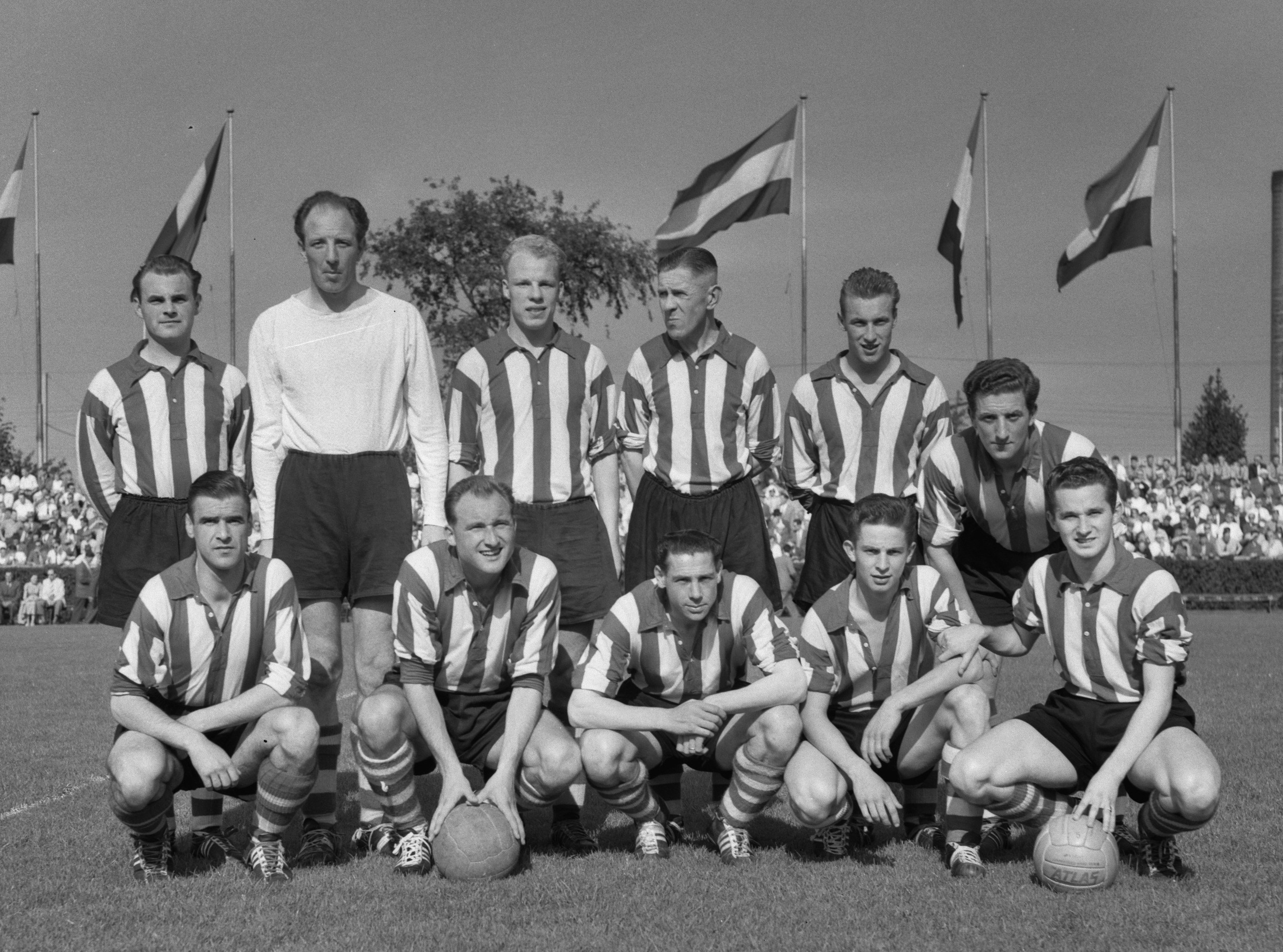 PSV tegen Elinkwijk. PSV elftal.